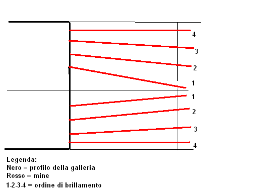 Einbruchschema